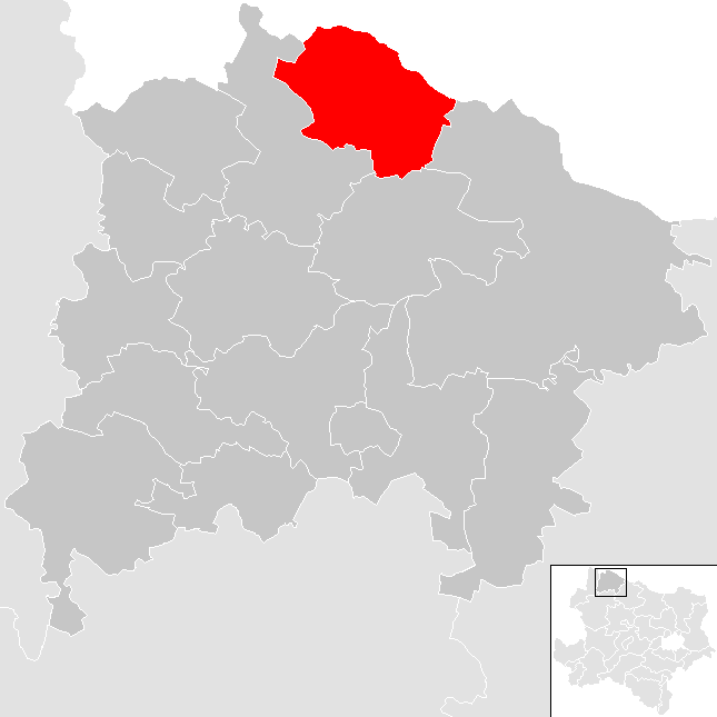 Bezirk Waidhofen an der Thaya